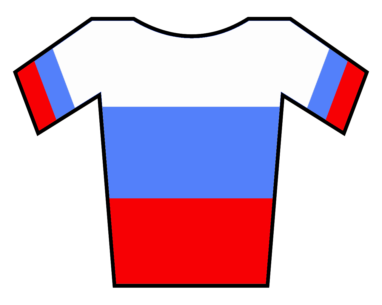 Maillot de Rusia